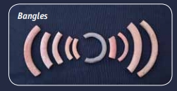 Индская цивилизация